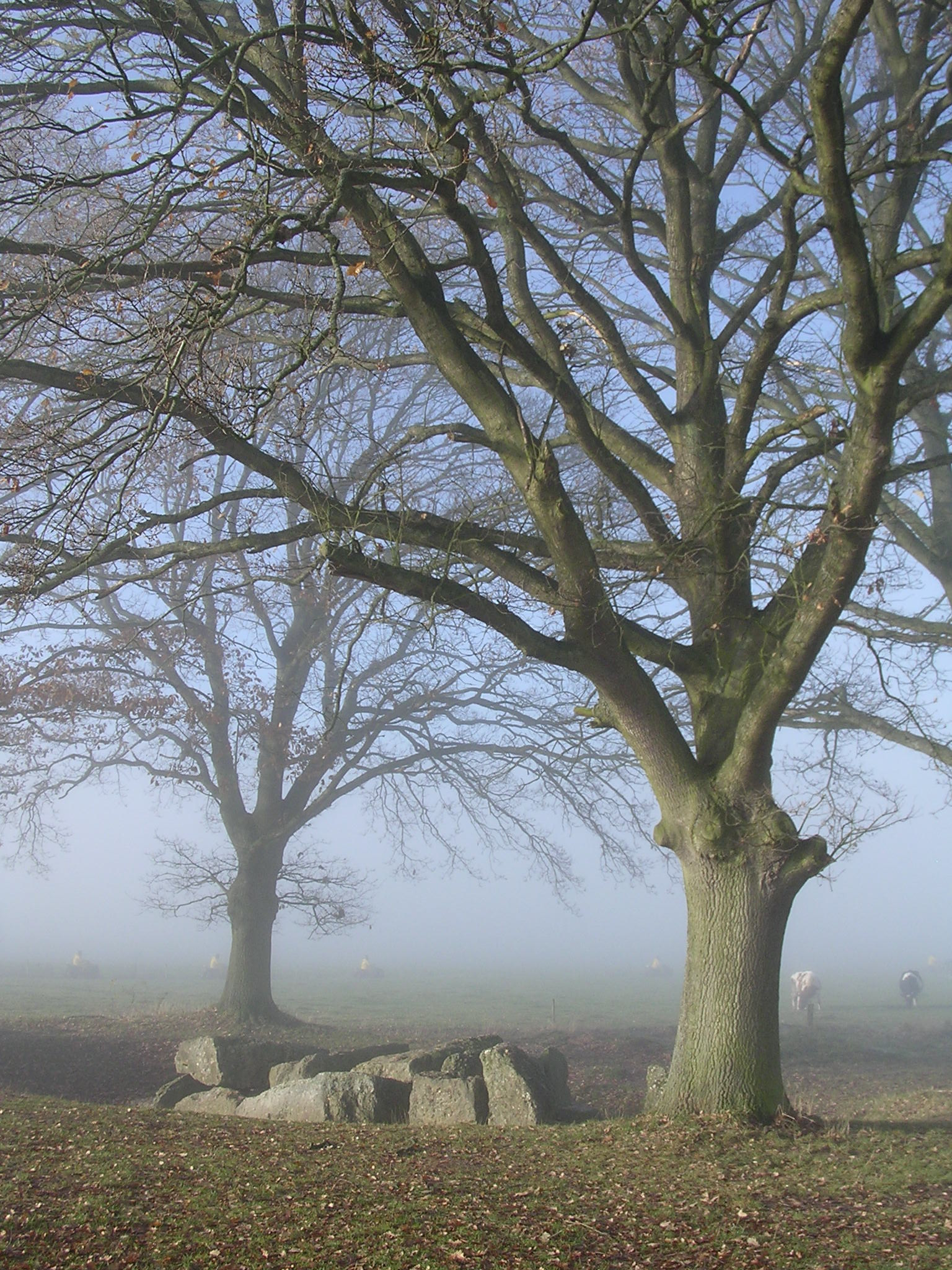 Dolmens situés sur le territoire de la commune de Wéris - dolmen dit de Weris ou dolmen Nord